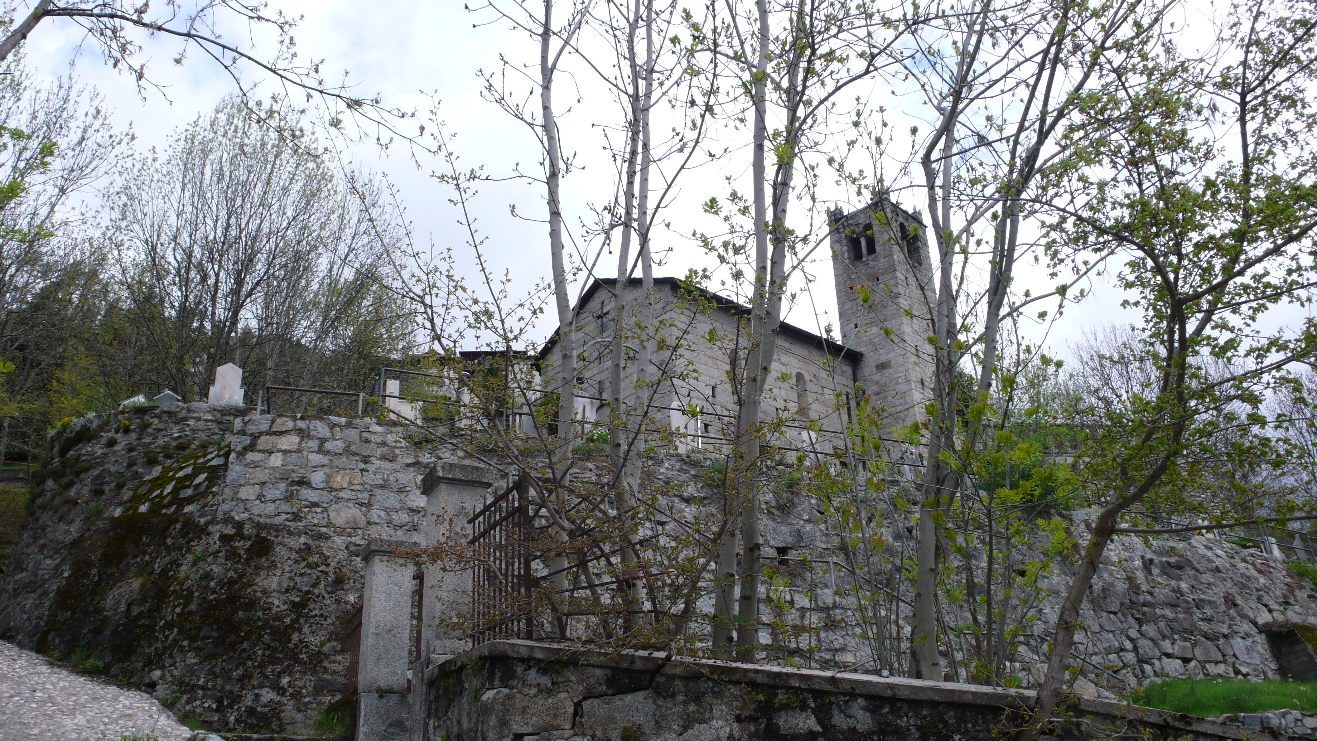 Scatto dopo il restauro del 1989